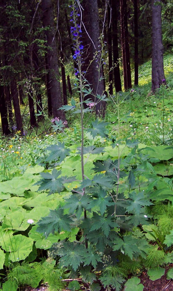 Delphinium elatum (pl. ostróżka wyniosła)